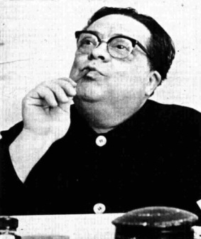 Italian actor Aldo Fabrizi